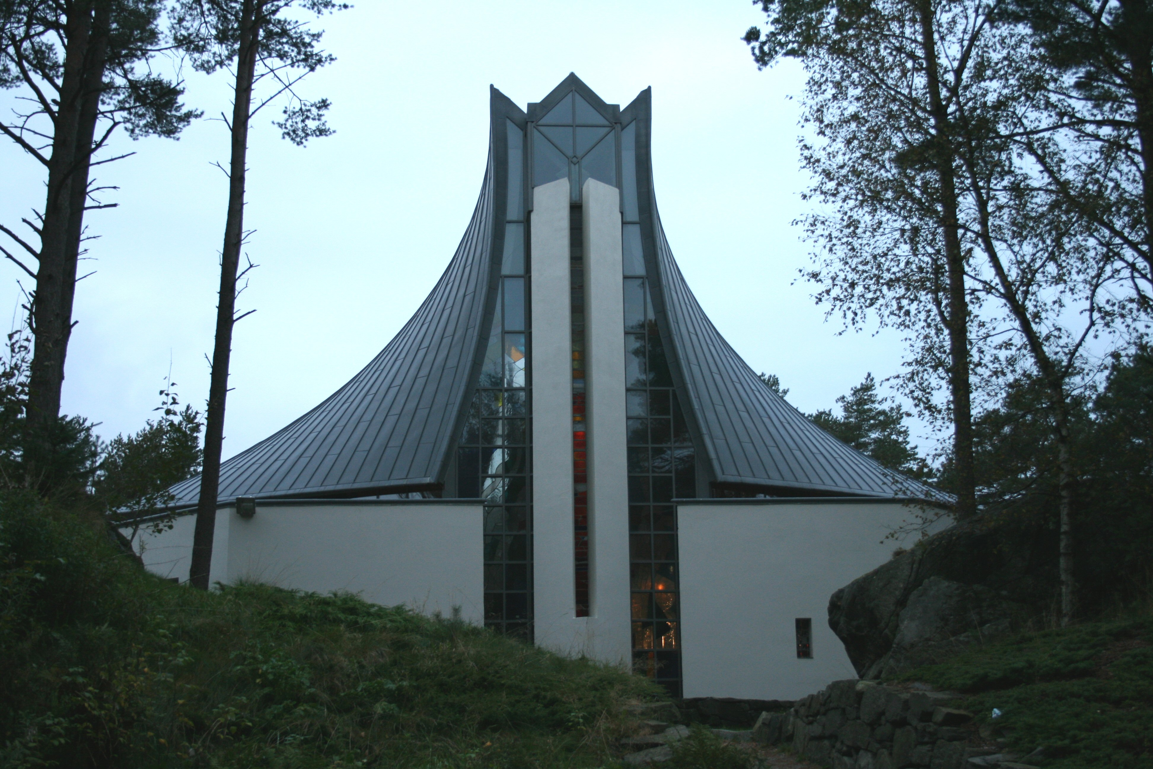 Hana kirke